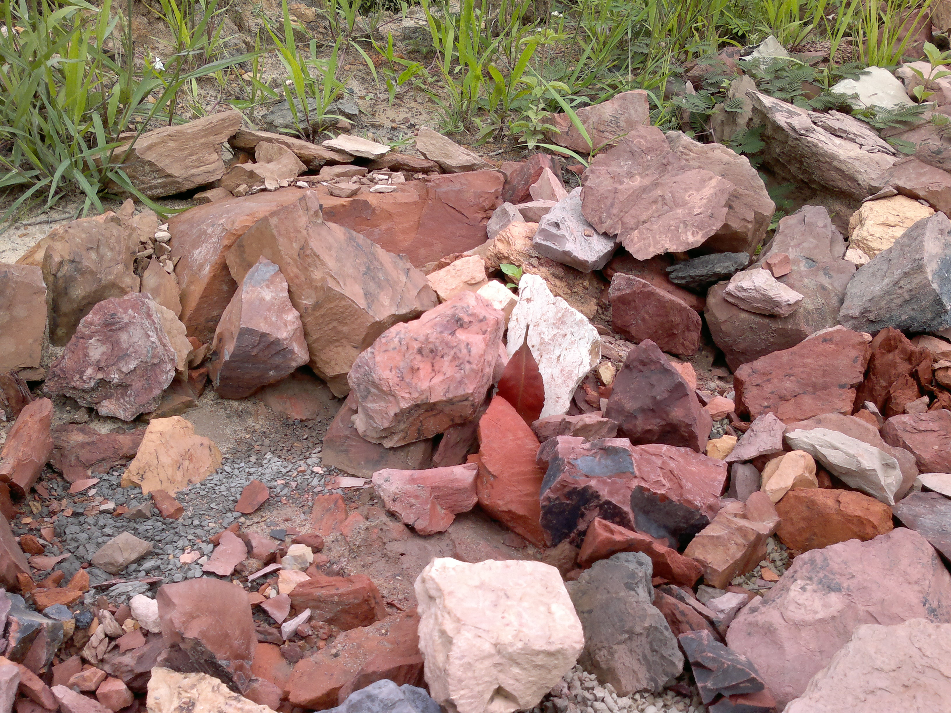 Laterit Kalimantan yang dapat digunakan sebagai agregat kasar beton